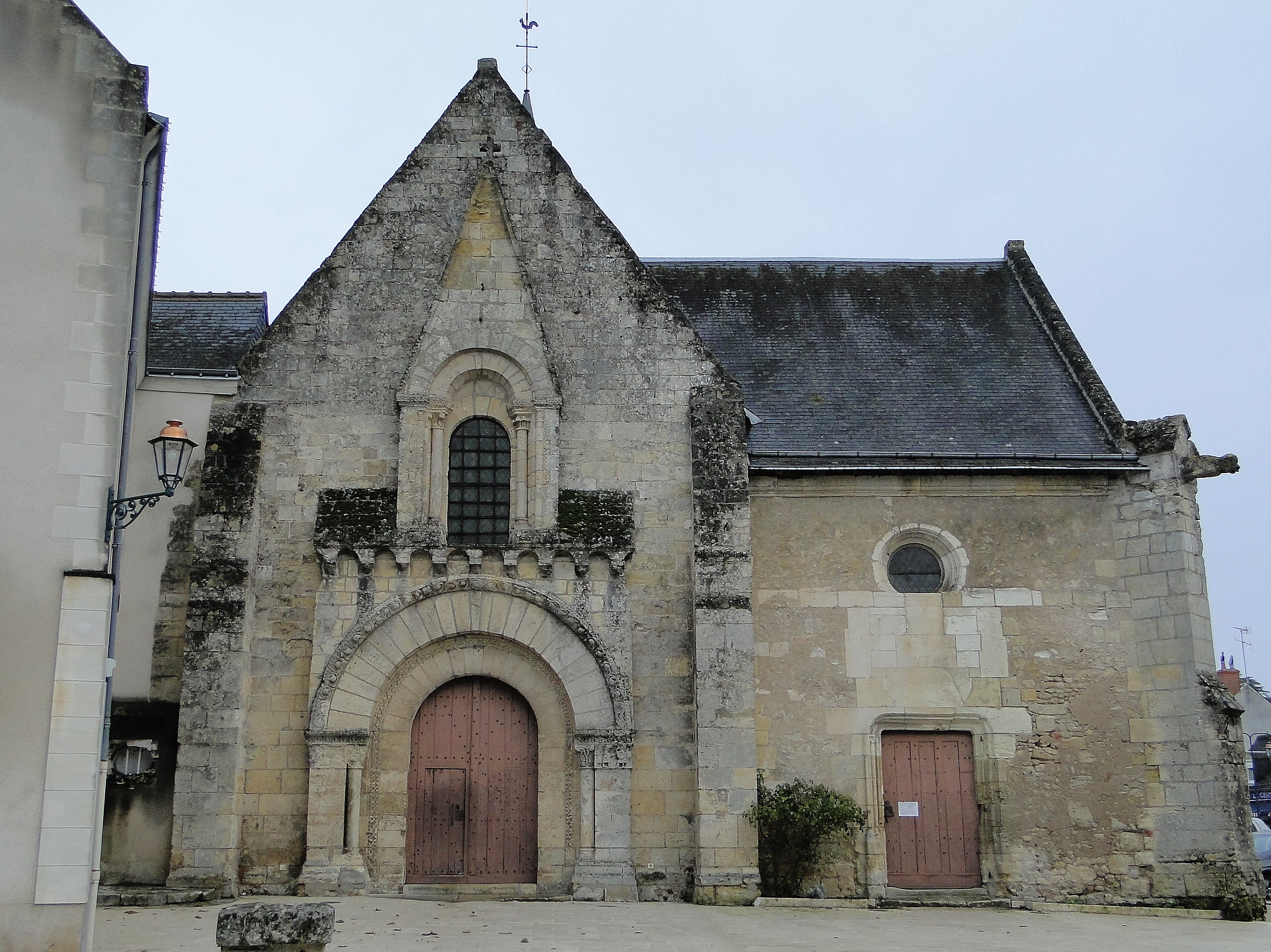 Église Sainte-Trininté de Vernou-sur-Brenne (Indre-et-Loire)